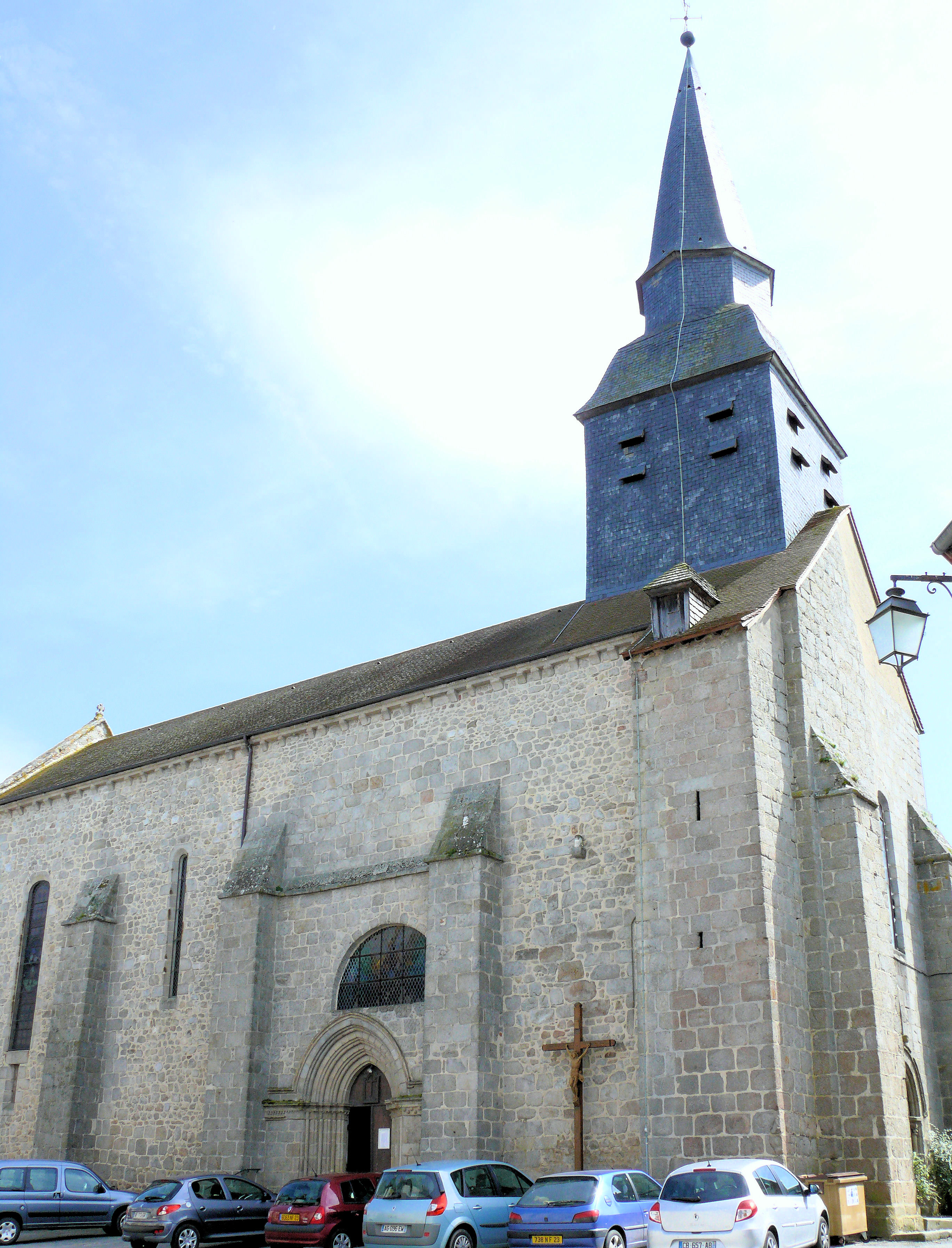 Chénérailles - Église Saint-Barthélémy - Clocher